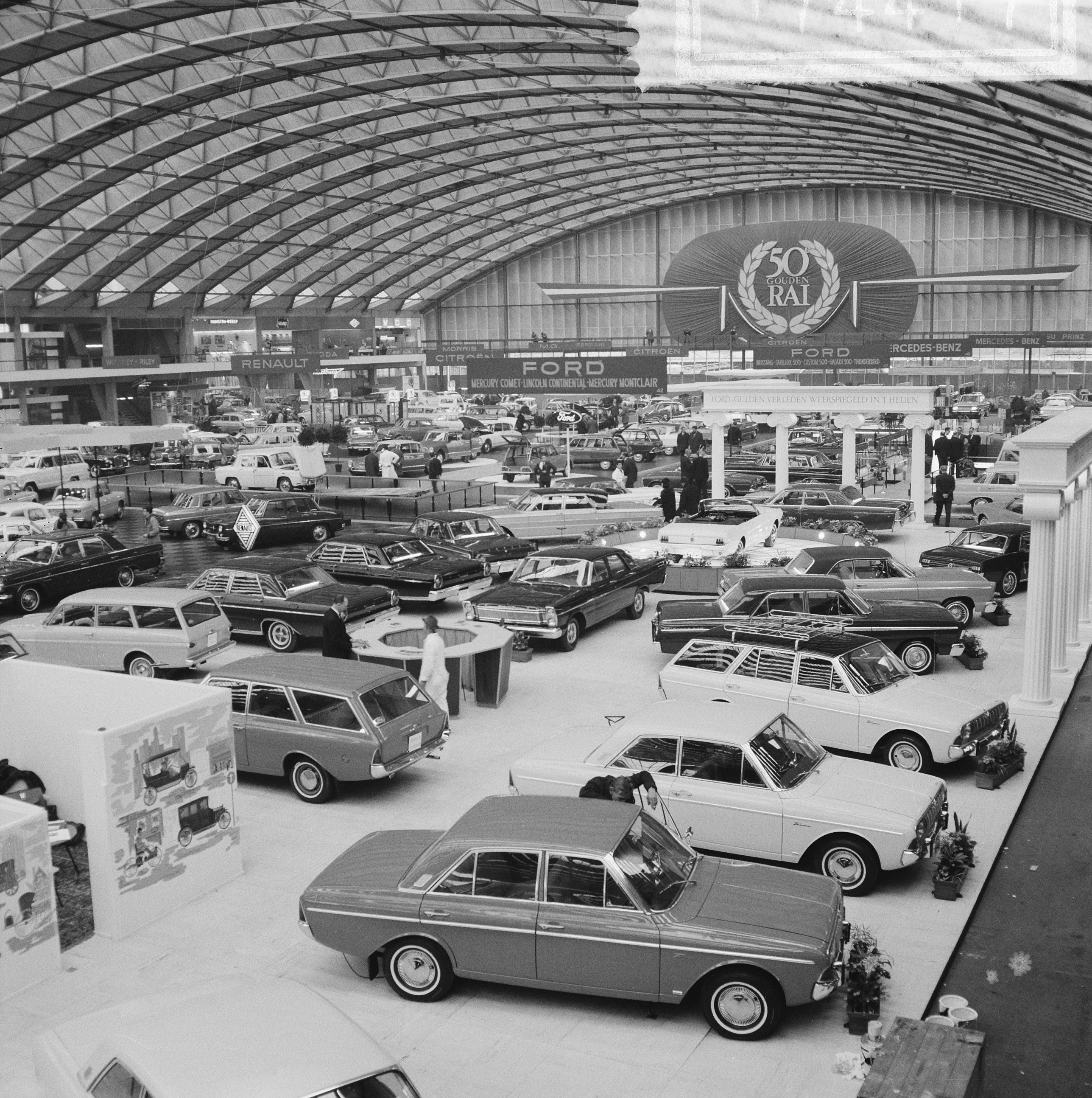 Collectie / Archief : Fotocollectie Anefo Reportage / Serie : [ onbekend ] Beschrijving : Gouden RAI, overzicht autotentoonstelling Datum : 17 februari 1965 Trefwoorden : auto's, overzichten, tentoonstellingen Instellingsnaam : RAI Fotograaf : Nijs, Jac. de / Anefo Auteursrechthebbende : Nationaal Archief Materiaalsoort : Negatief (zwart/wit) Nummer archiefinventaris : bekijk toegang 2.24.01.03 Bestanddeelnummer : 917-4417